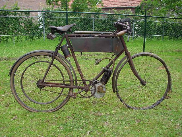 Perfecta 1902 onbekend.